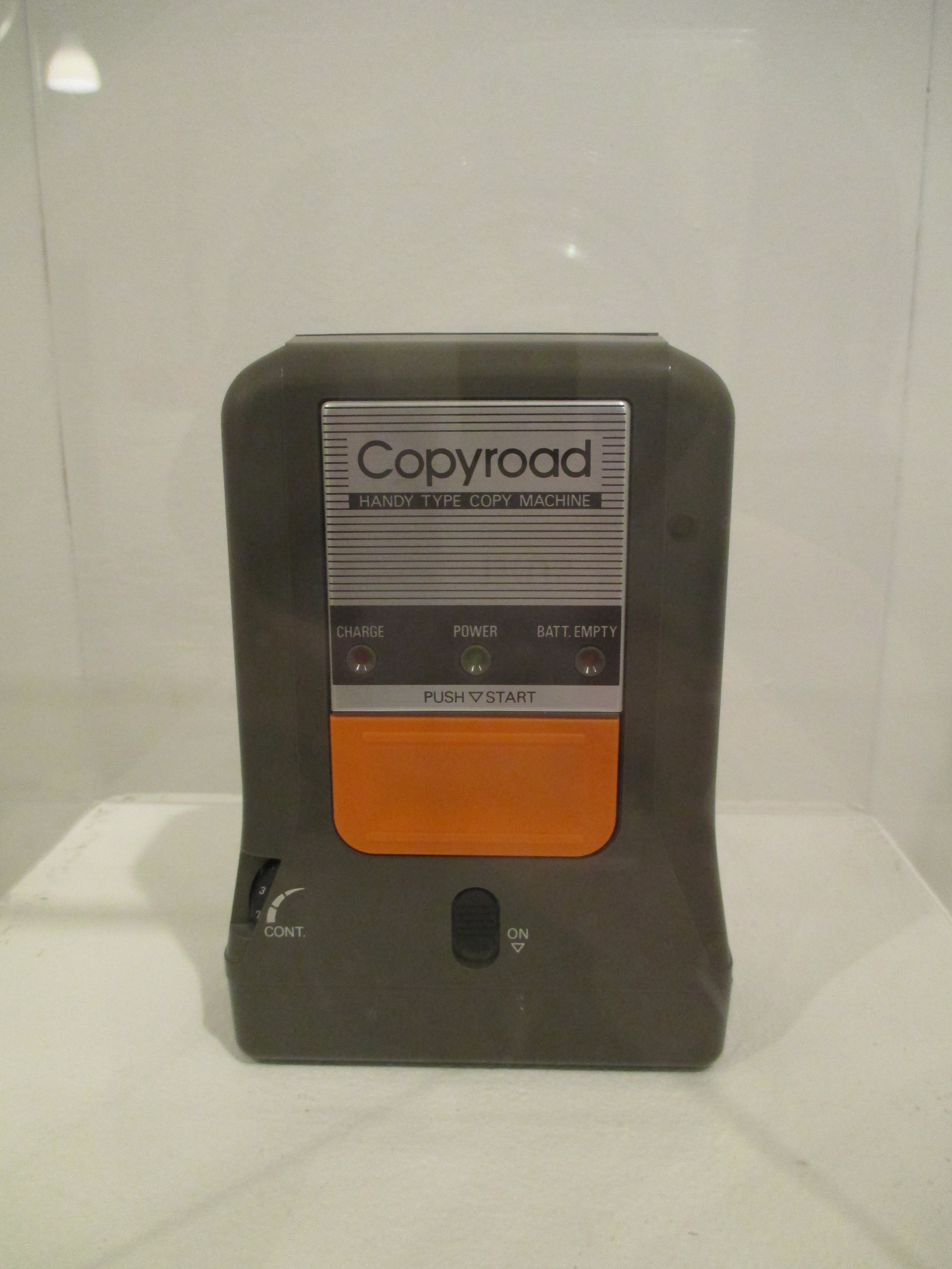 Makroscope - Useum für Fotokopie, Sammlung Urbons: Handcopierer MBO Copyroad von 1990